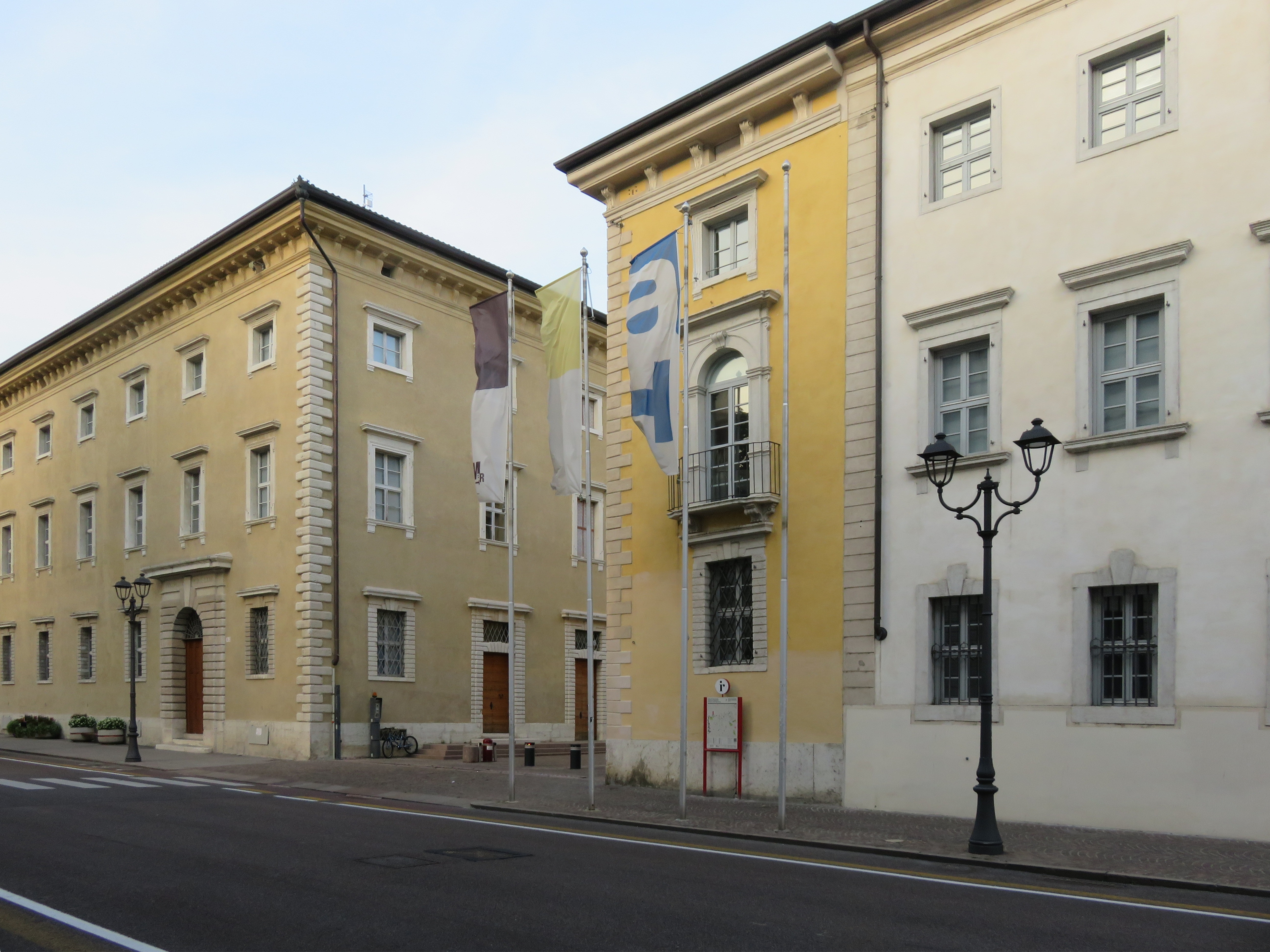 Palazzo Annona e Palazzo Alberti Poja da Corso Bettini. Il passaggio tra i due è l'accesso al Mart